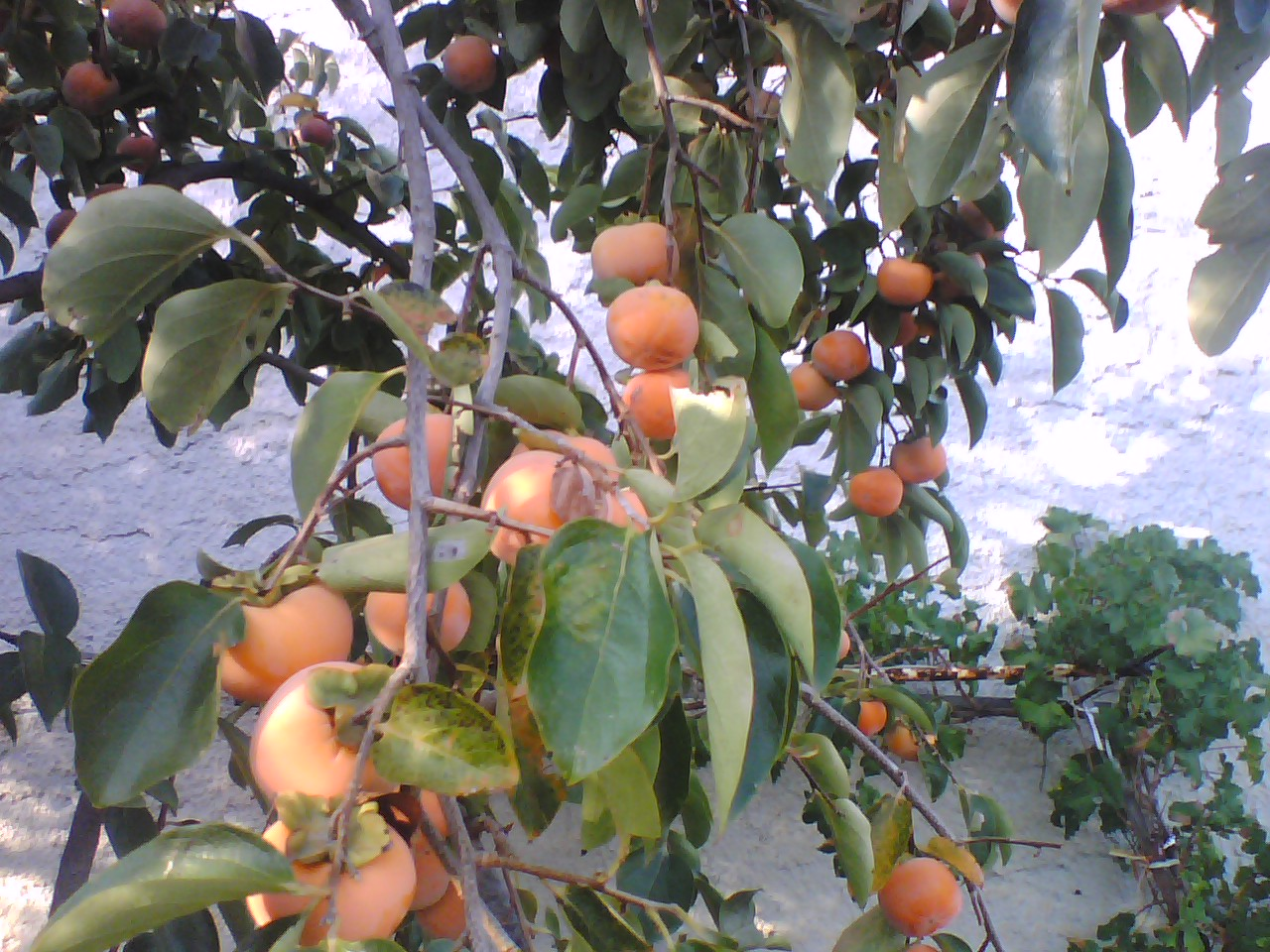 IL KAKI